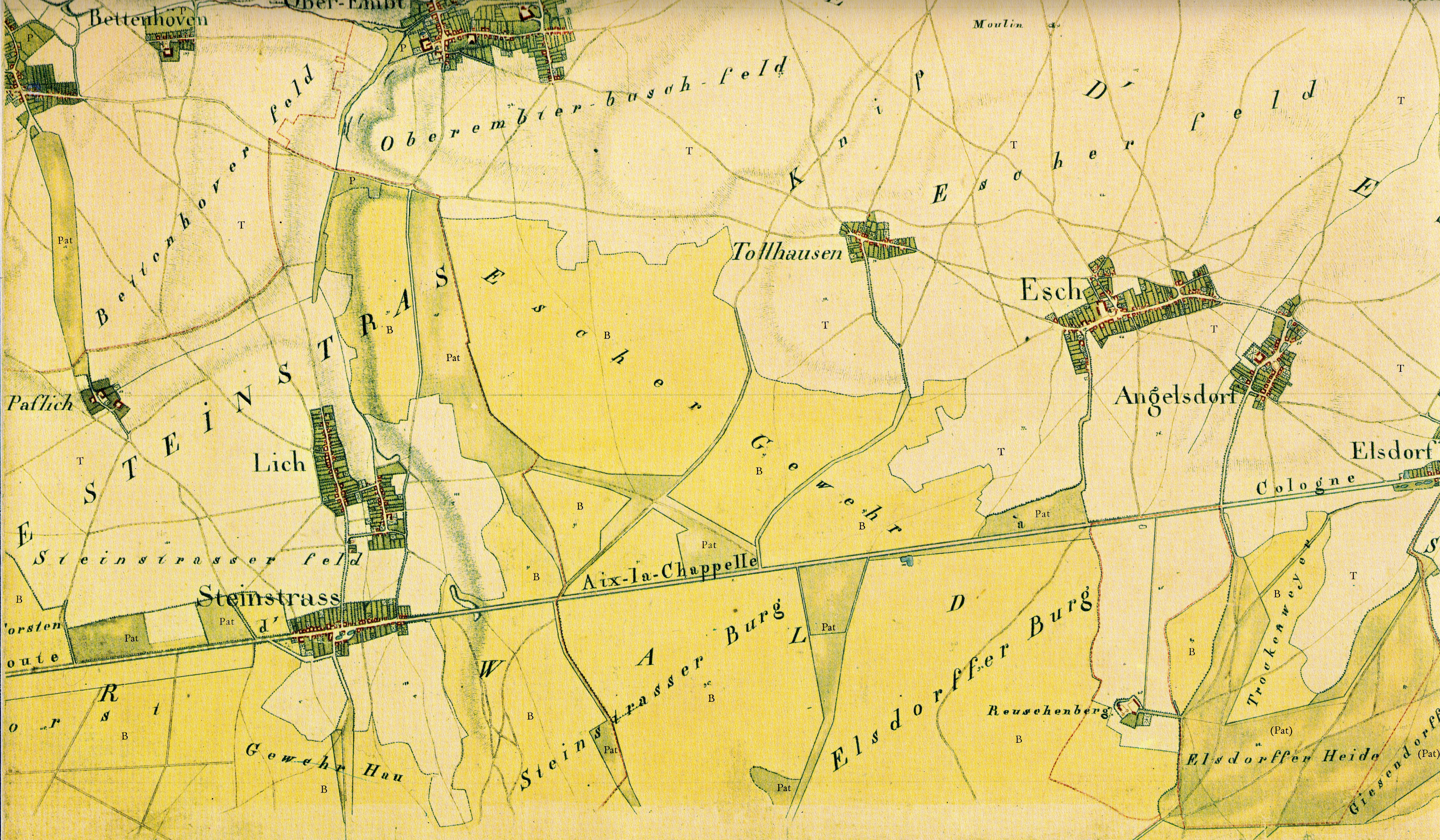 Kartenaufnahme der Rheinlande durch Tranchot und von Müffling